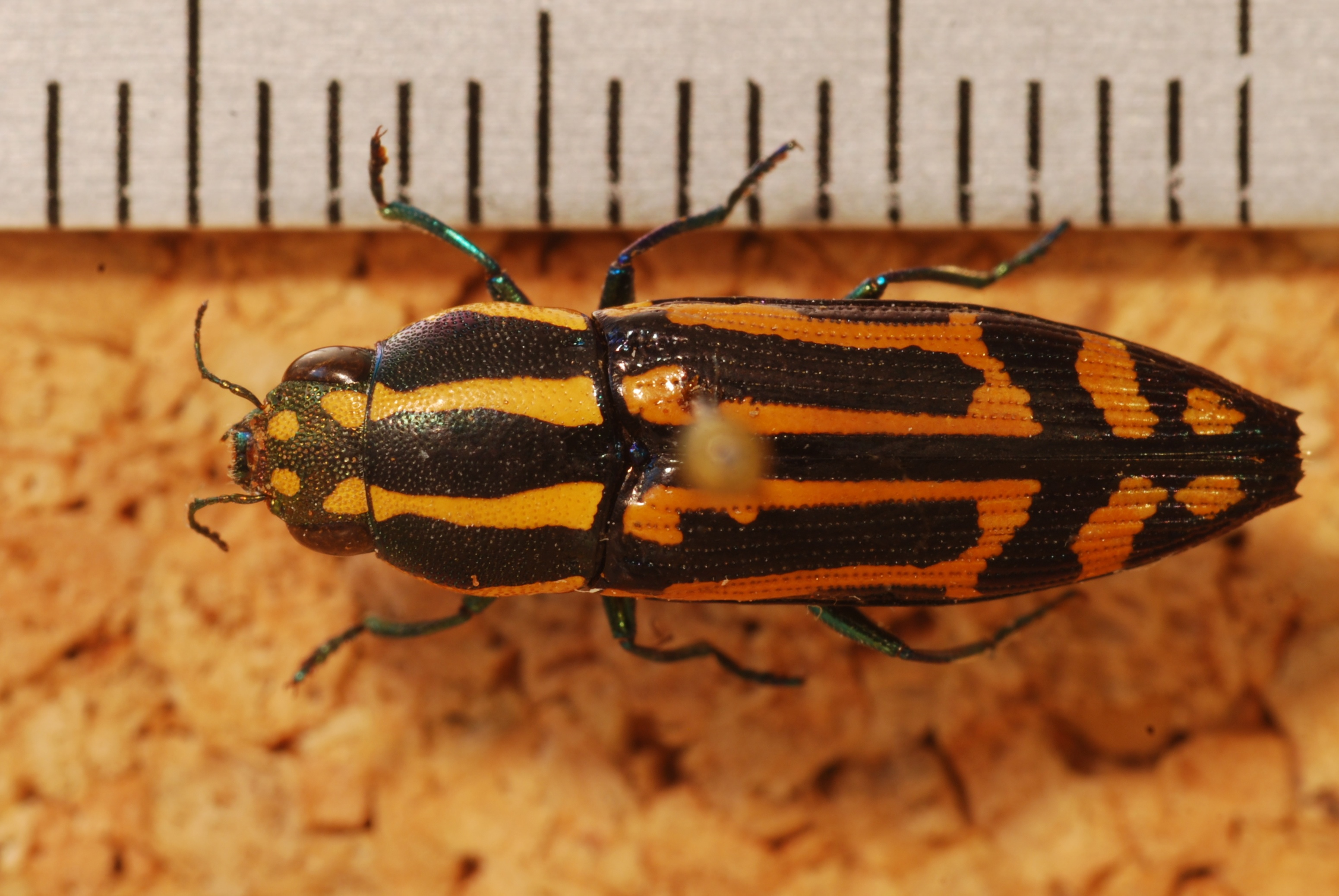 Amphoe Fang, Chiang Mai, THAILAND